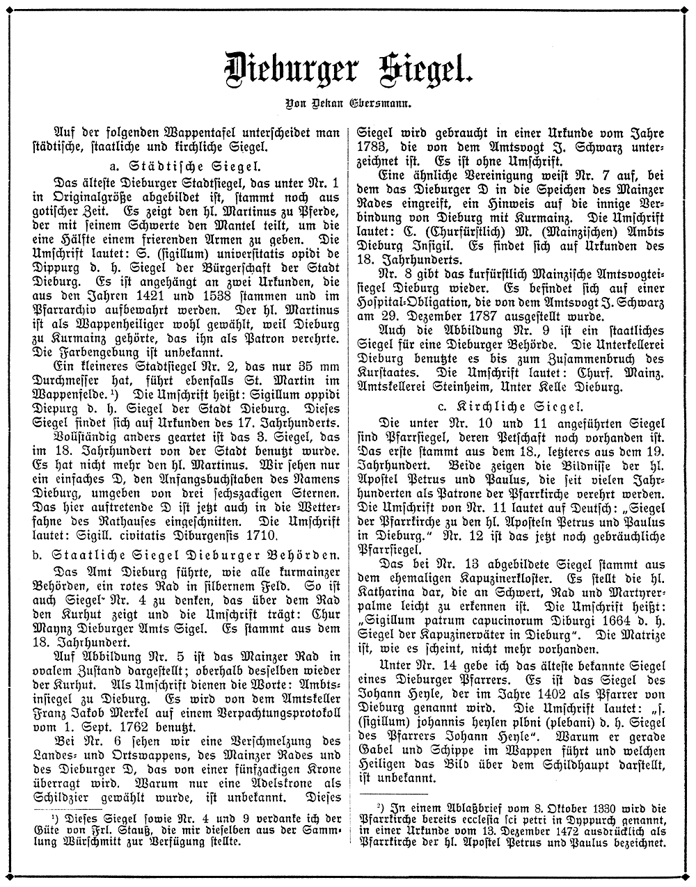 Dekan Jakob Ebersmann ist am 1.11.1930 gestorben.